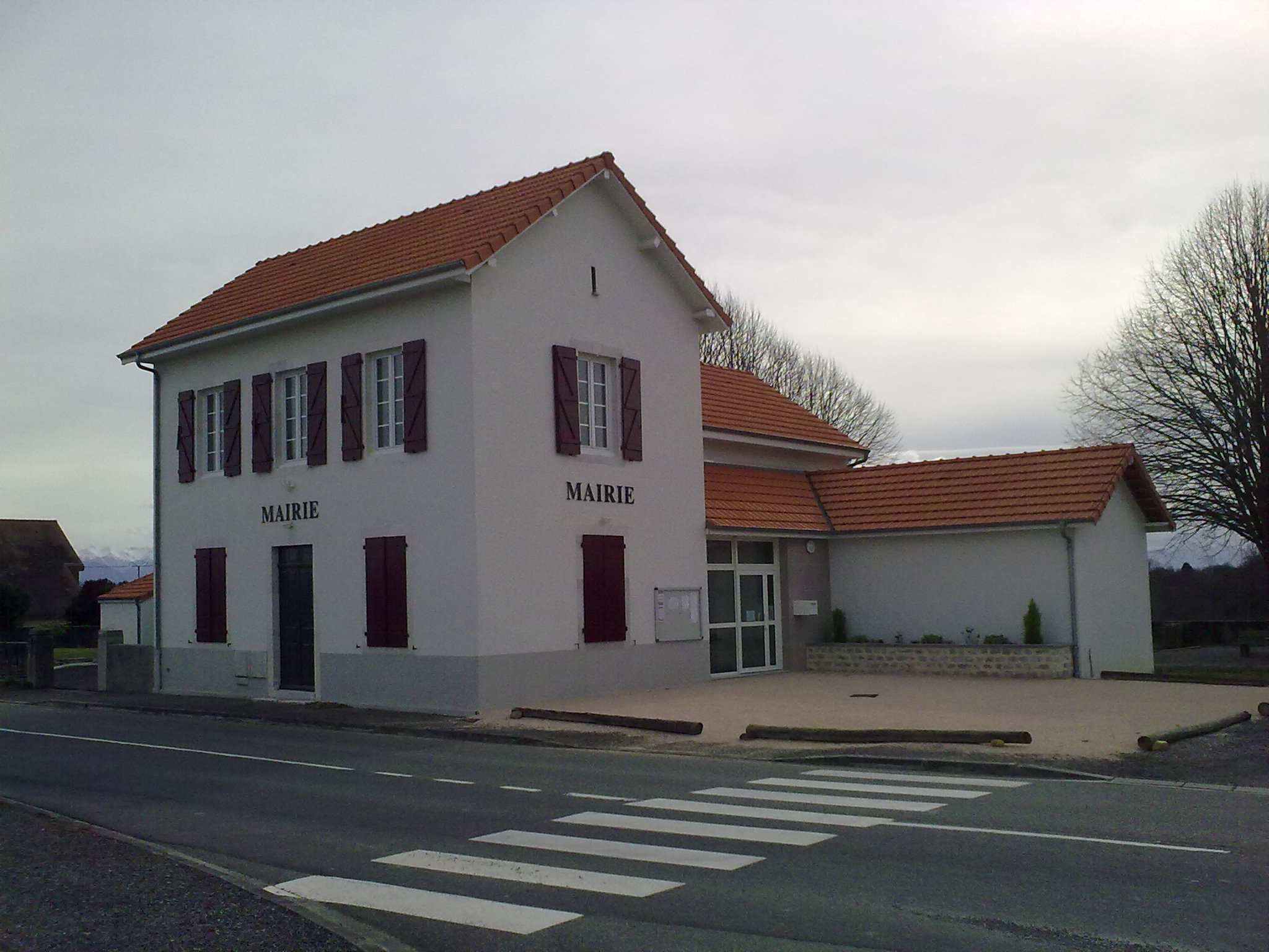 Mairie de Maucor